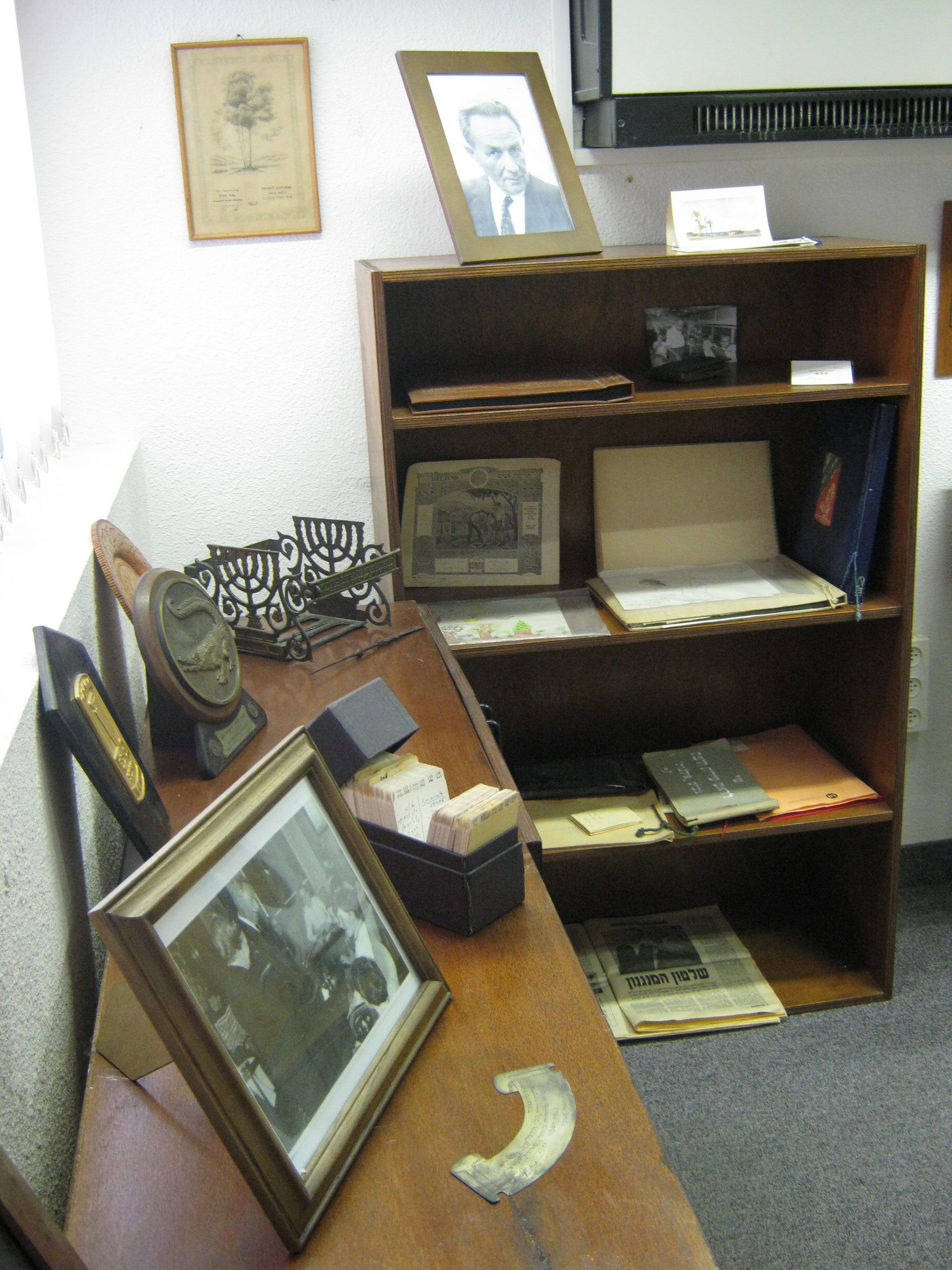 כמה מחפציו האישיים של אבא חושי המוצגים בארכיון